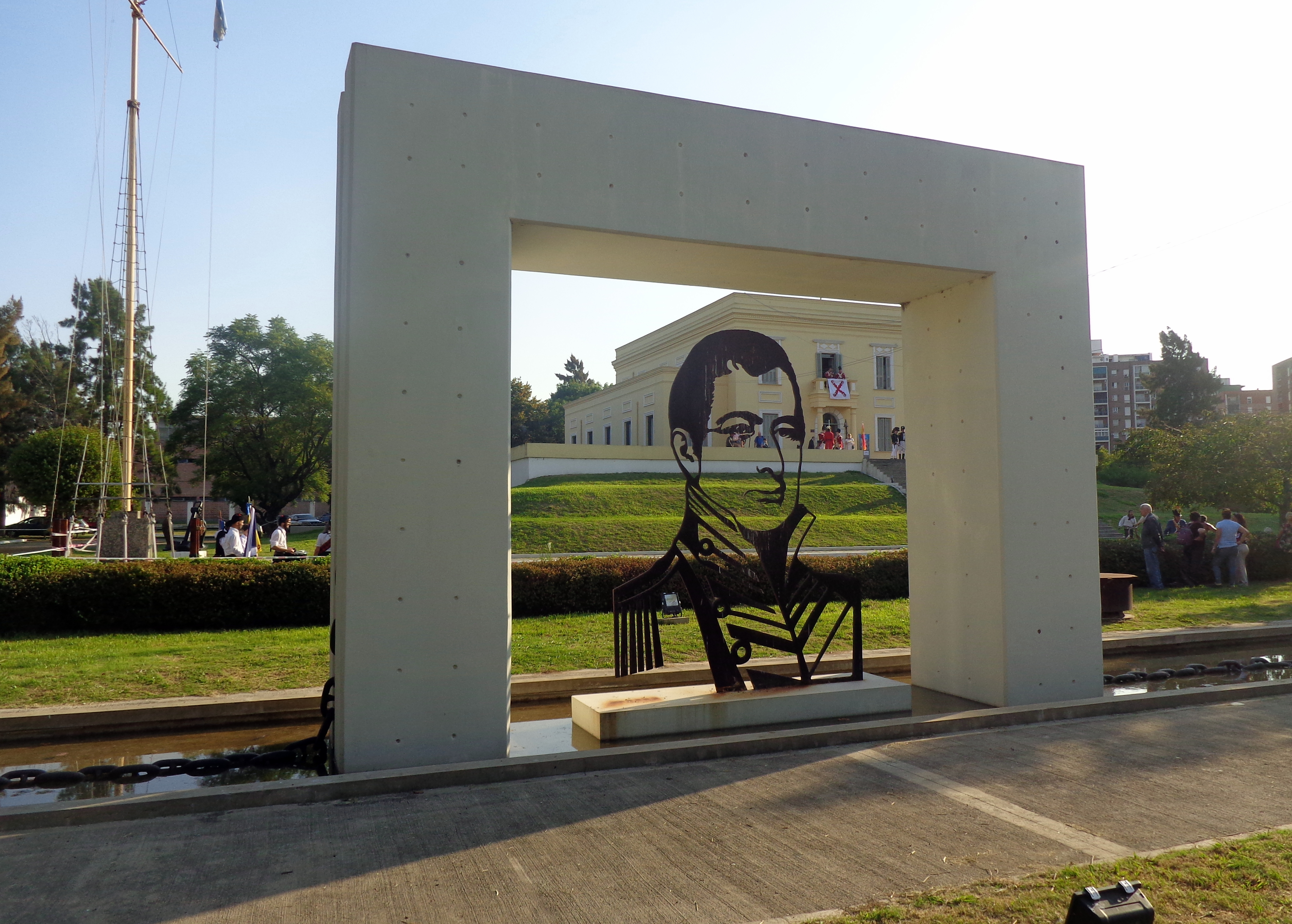 Casa Amarilla, en la Avenida Almirante Brown, réplica de la casa donde vivió, el almirante. Actualmente funciona allí el Instituto Histórico de Estudios Navales. Buenos Aires, Argentina.